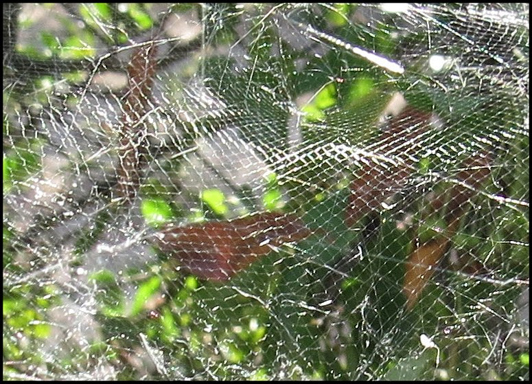 Toile composite de Cyrtophora citricola (Araneidae) : portion du dôme montrant l'absence de spirale visqueuse et ses innombrables mailles carrées d'aspect caractéristique. Région de Béziers, Occitanie, Juillet 2019.